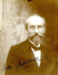 Maixner, Miloš, český pedagog, překladatel a hermetik